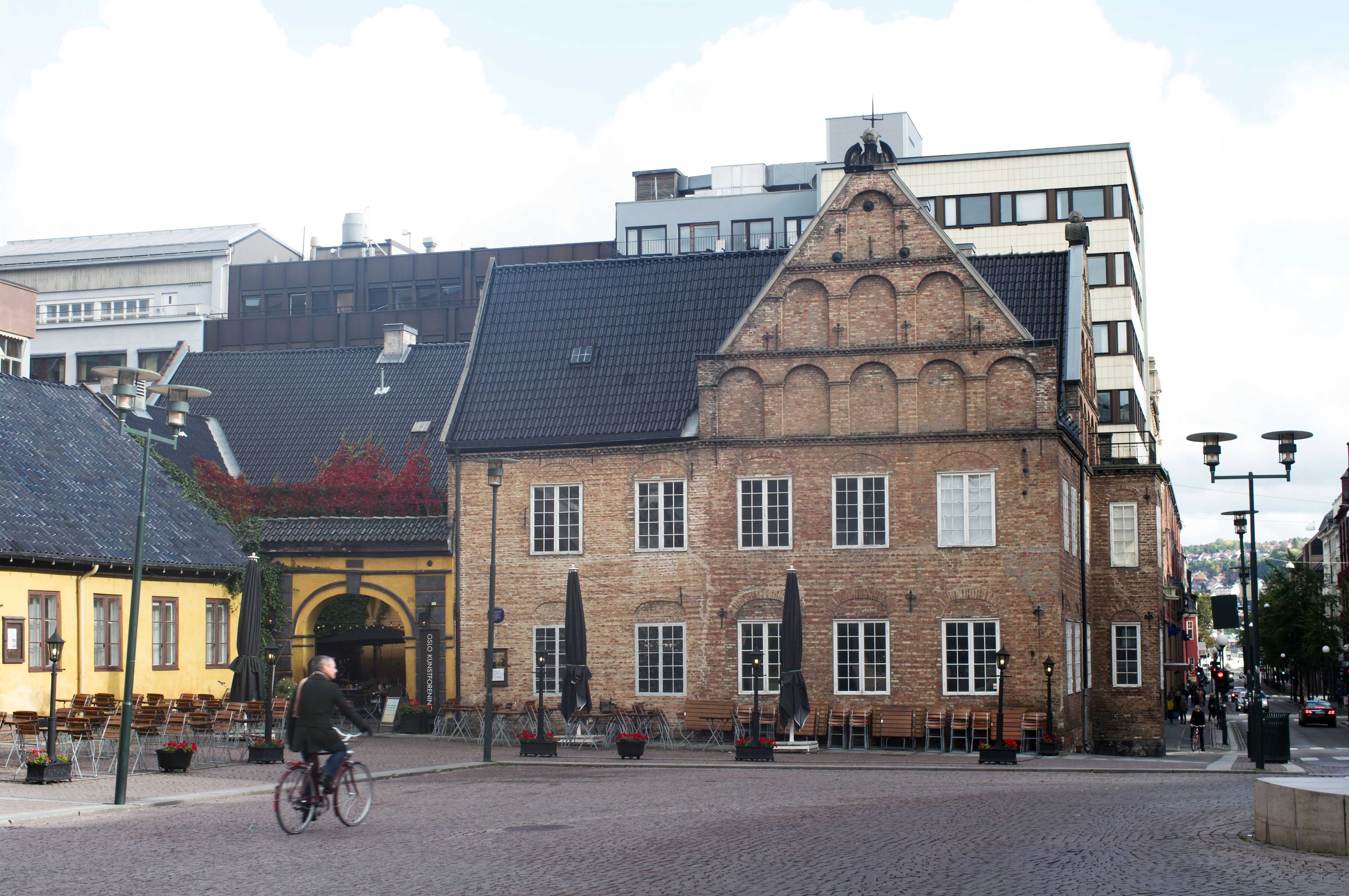 Rådmannsgården, Oslo, Norway.